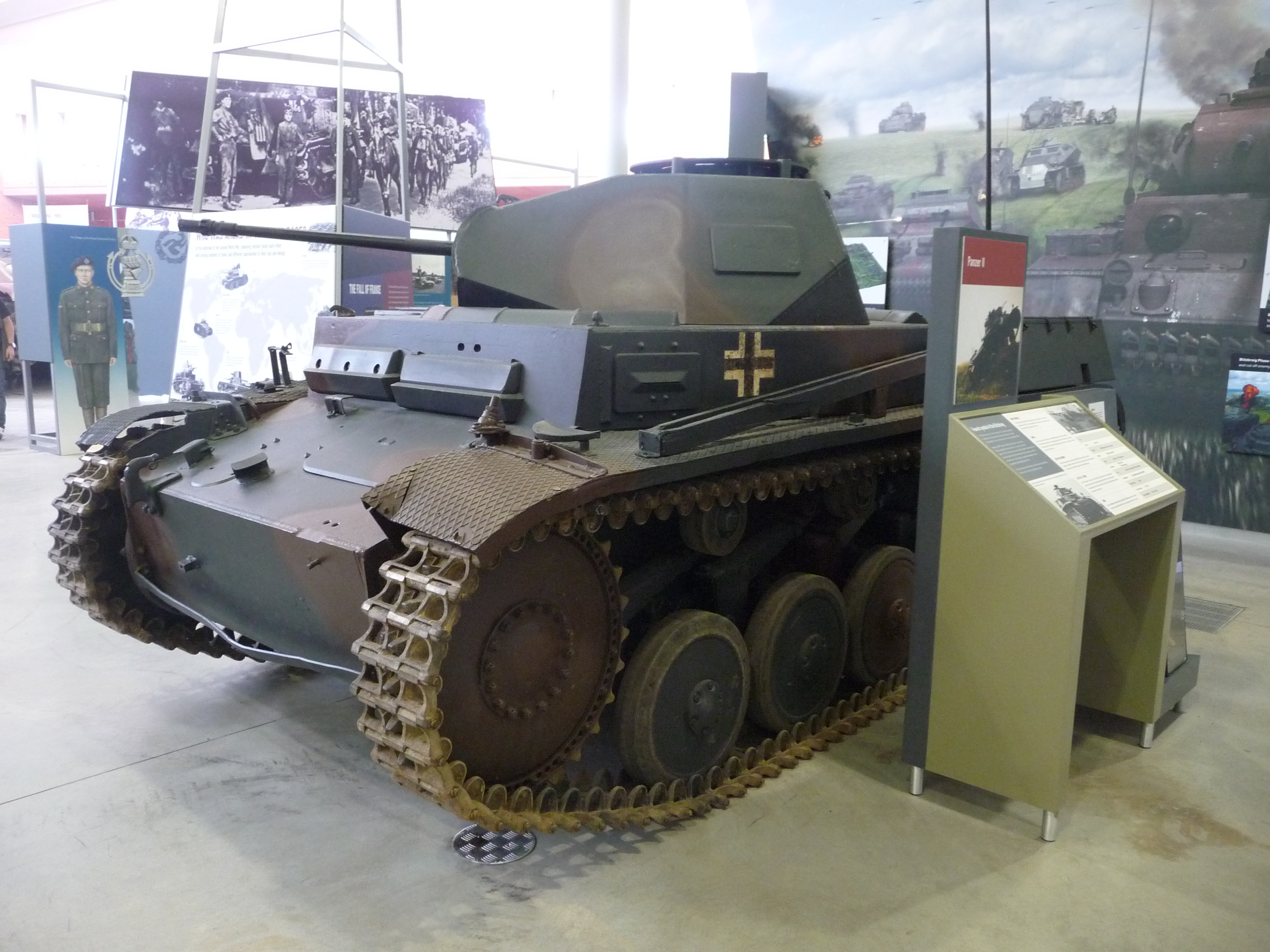 Sd Kfz 121 Panzerkampfwagen II Ausf F (Panzer II)